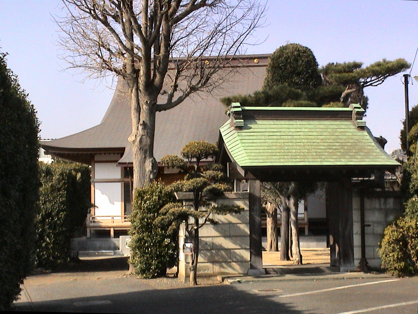 空乗寺本堂